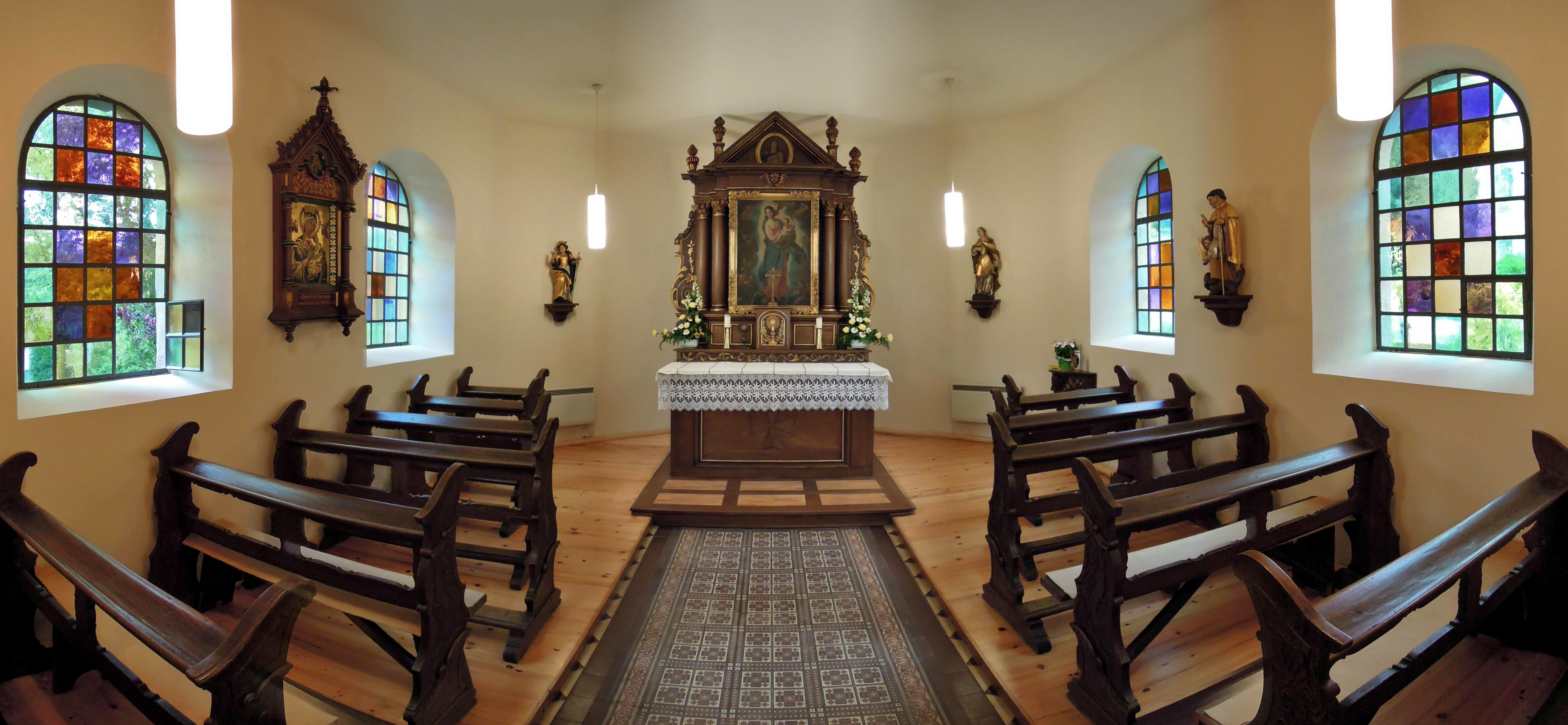 Körpricher Straße, kath. Kapelle St. Luzia, 1811 (Einzeldenkmal)